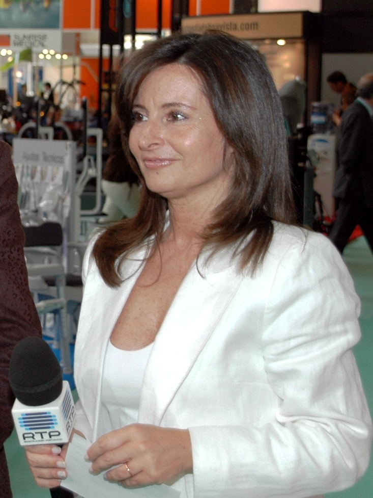 Serenella Andrade at Exponor in 2007